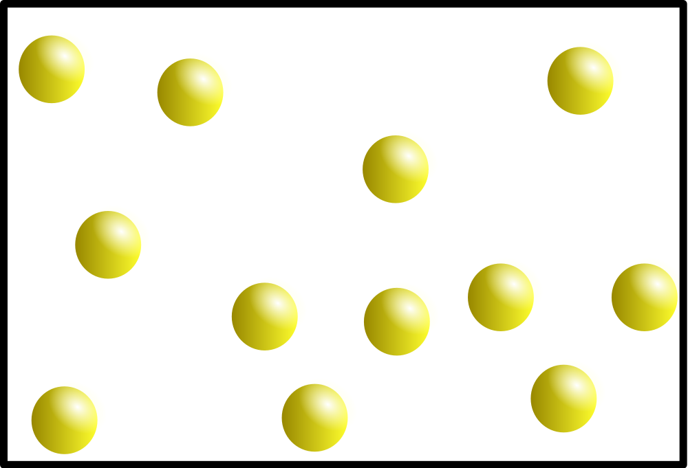 Gas model